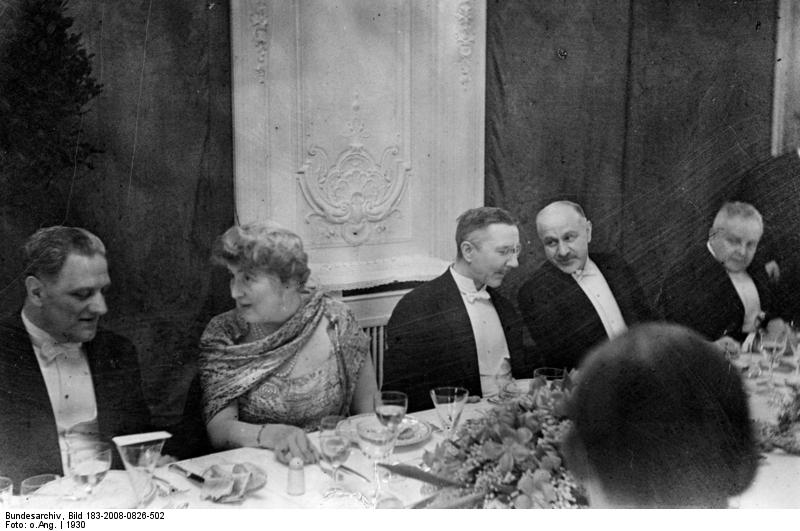 Berlin, Empfang im Hotel "Esplanade" Empfangsabend des italienischen Botschafters Orsini-Baroni im Hotel "Esplanade". Dr. Stefani, Frau Orsini Baroni , Schacht, Hagern, Sobernheim [von links] [Berlin.- Empfang des italienischen Botschafters Luca Orsini Baroni im Hotel "Esplanade",] Abgebildete Personen: Schacht, Hjalmar Dr.: Reichswirtschaftsminister, Reichsbankpräsident, Nürnberger Prozeß, Deutschland (GND 118606026) Orsini Baroni, Luca: Botschafter in Deutschland, Italien (GND 117147540)